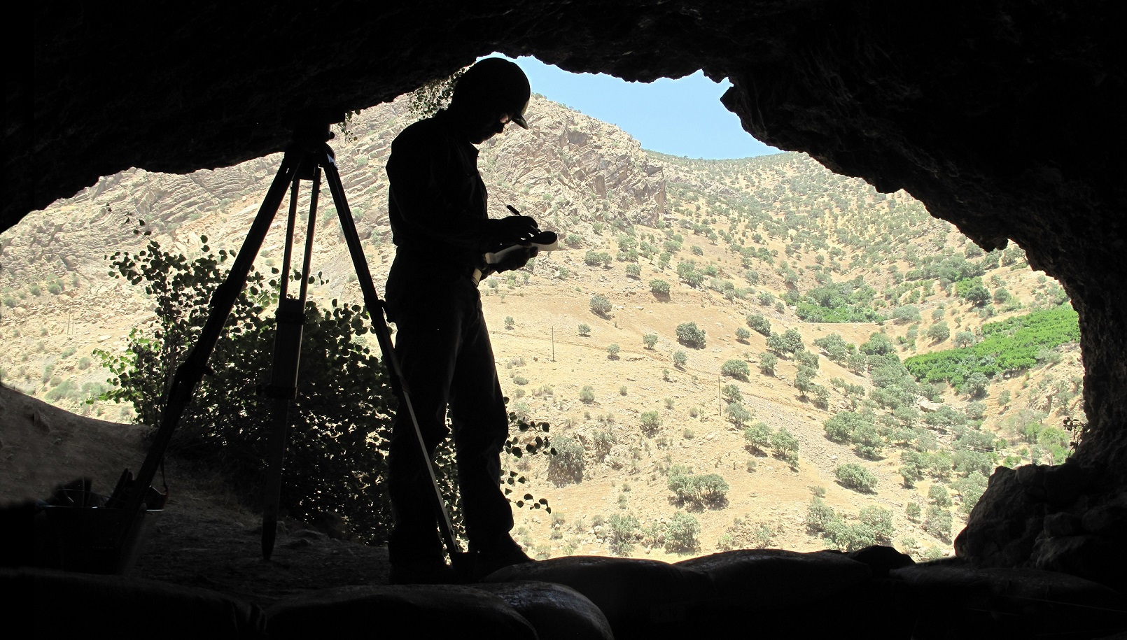 کاوش در غار کناچه در نزدیکی رودخانه سیروان